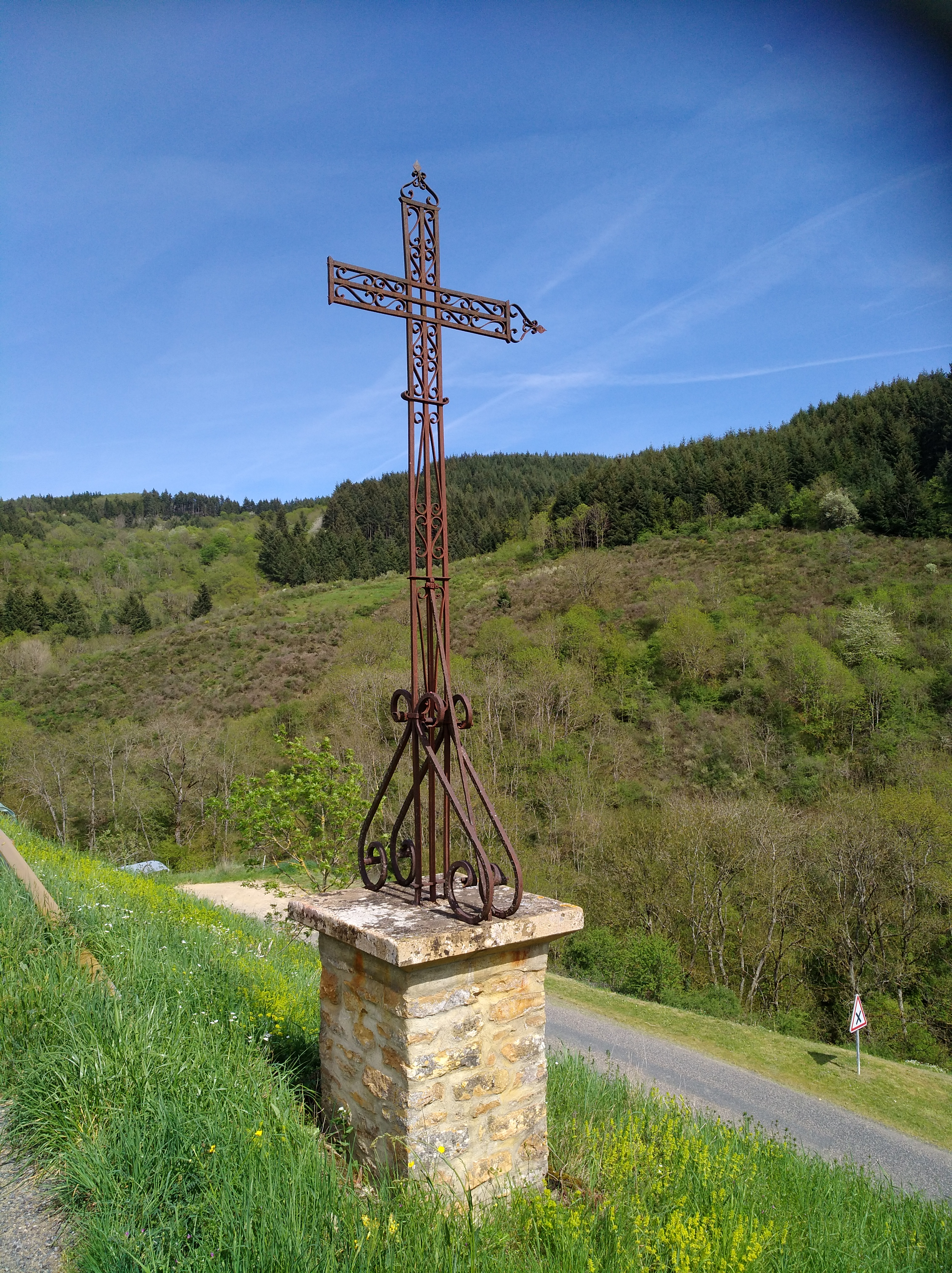 Croix métallique de chemin au lieu-dit "Le Chagnard", sur la commune de Dième (Rhône, France).